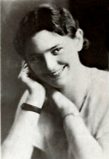 Marguerite Bervoets, résistante belge exécutée durant la Seconde Guerre mondiale.